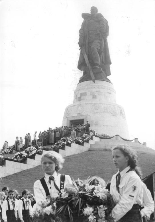 Zentralbild-Funck-, 8. 5. 1954 Zum Tag der Befreiung 1954 (Berlin Ehrenmal in Treptow)Am 8. Mai 1954 jährt sich zum neunten Mal der Tag der Befreiung des deutschen Volkes vom Hitlerfaschismus. Aus diesem Anlass legten die Mitglieder der Regierung der Deutschen Demokratischen Republik, des Diplomatischen Korps und Delegationen der demokratischen Massenorganisationen, sowie der Berliner Betriebe am Ehrenmal der gefallenen Helden dre Sowjetarmee in Berlin-Treptow in den Vormittagsstunden des 8. Mai Kränze nieder. UBZ: Eine Delegation Junger Pioniere vor dem Ehrenmal.